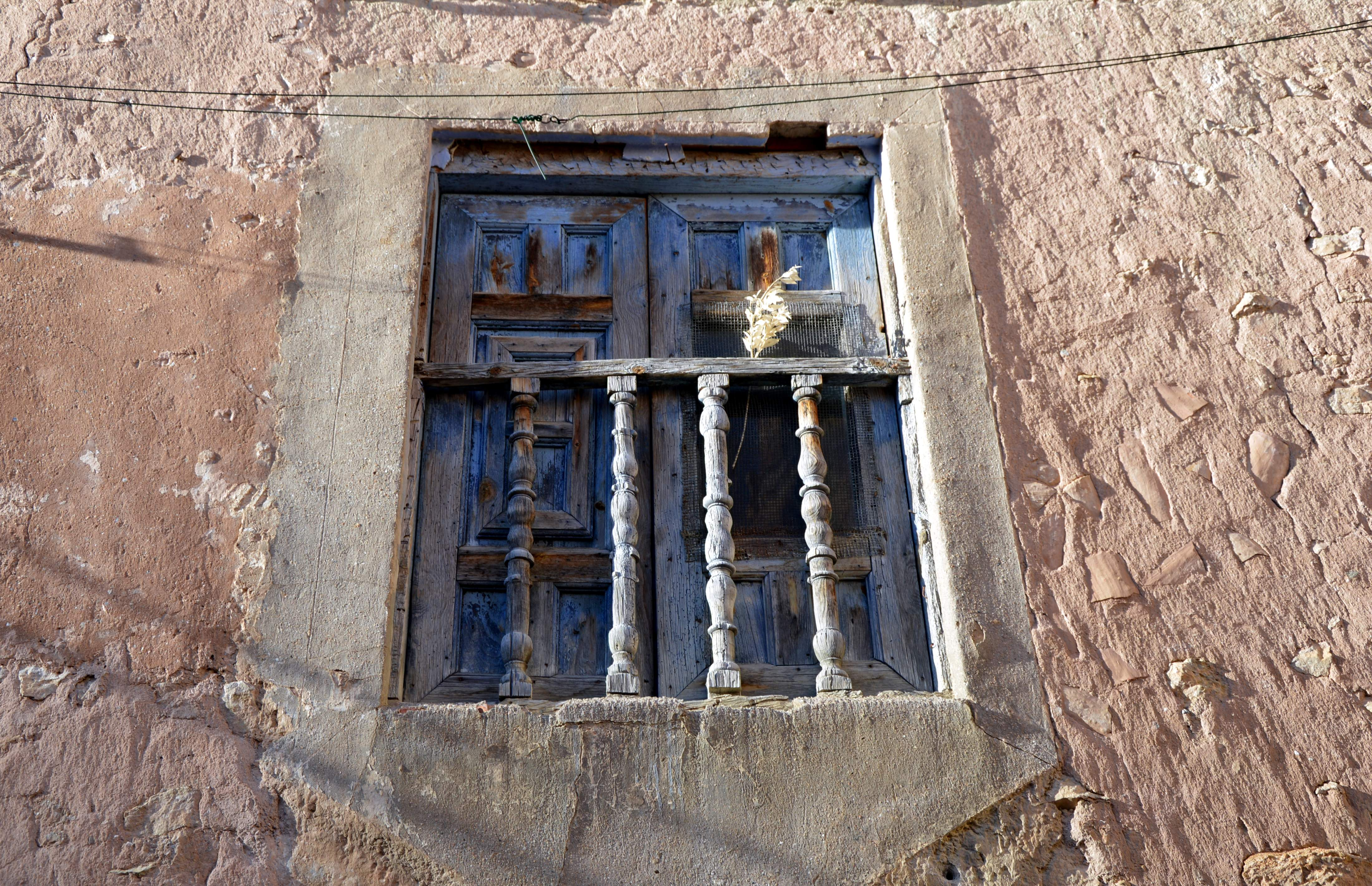 Detalle de ventana-balcón en la fachada de una casa de Tormón (Teruel), muestra de arquitectura vernácula (2017).